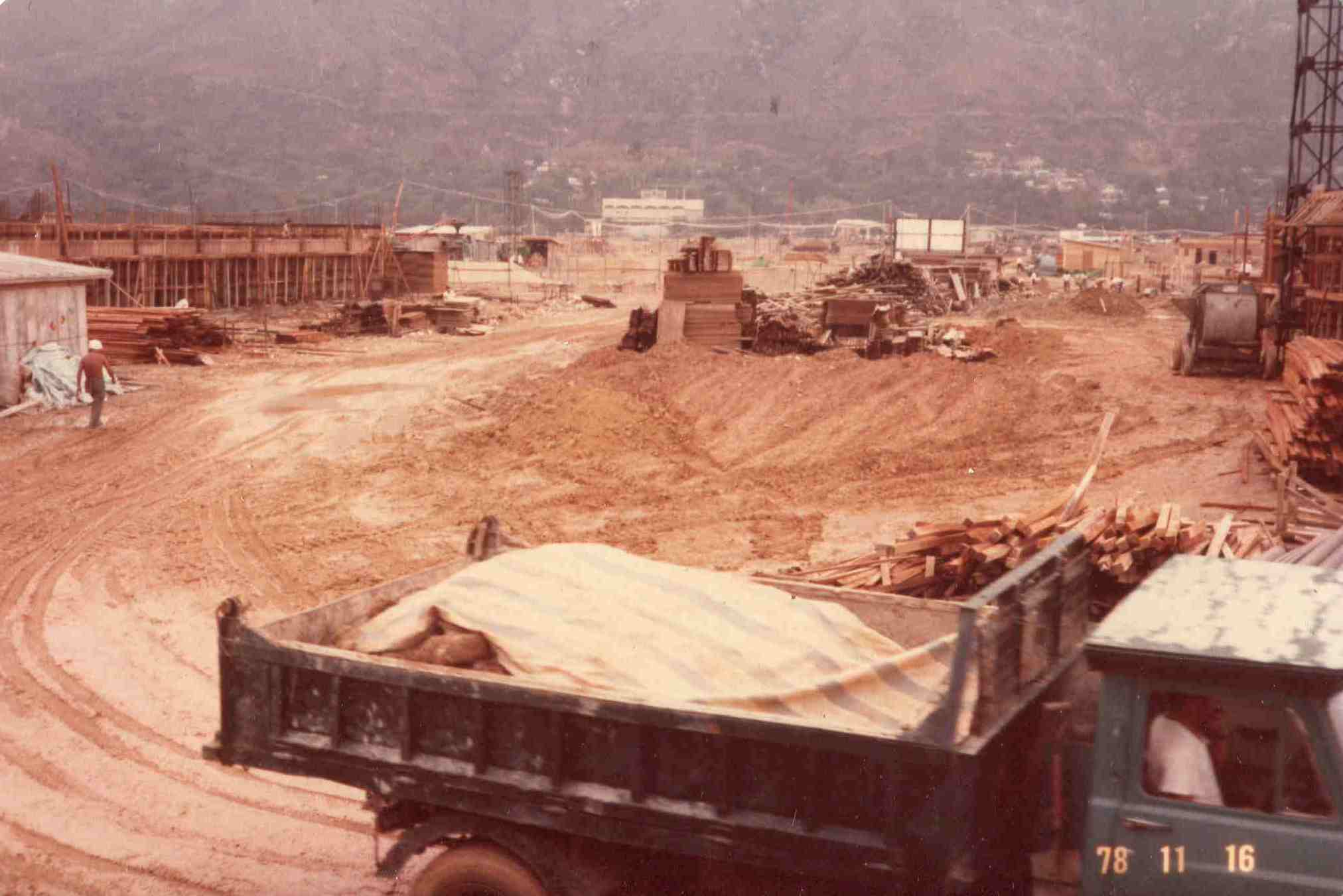 1978年11月16日香港的建築工地。香港測量師學會測量師張順光提供。